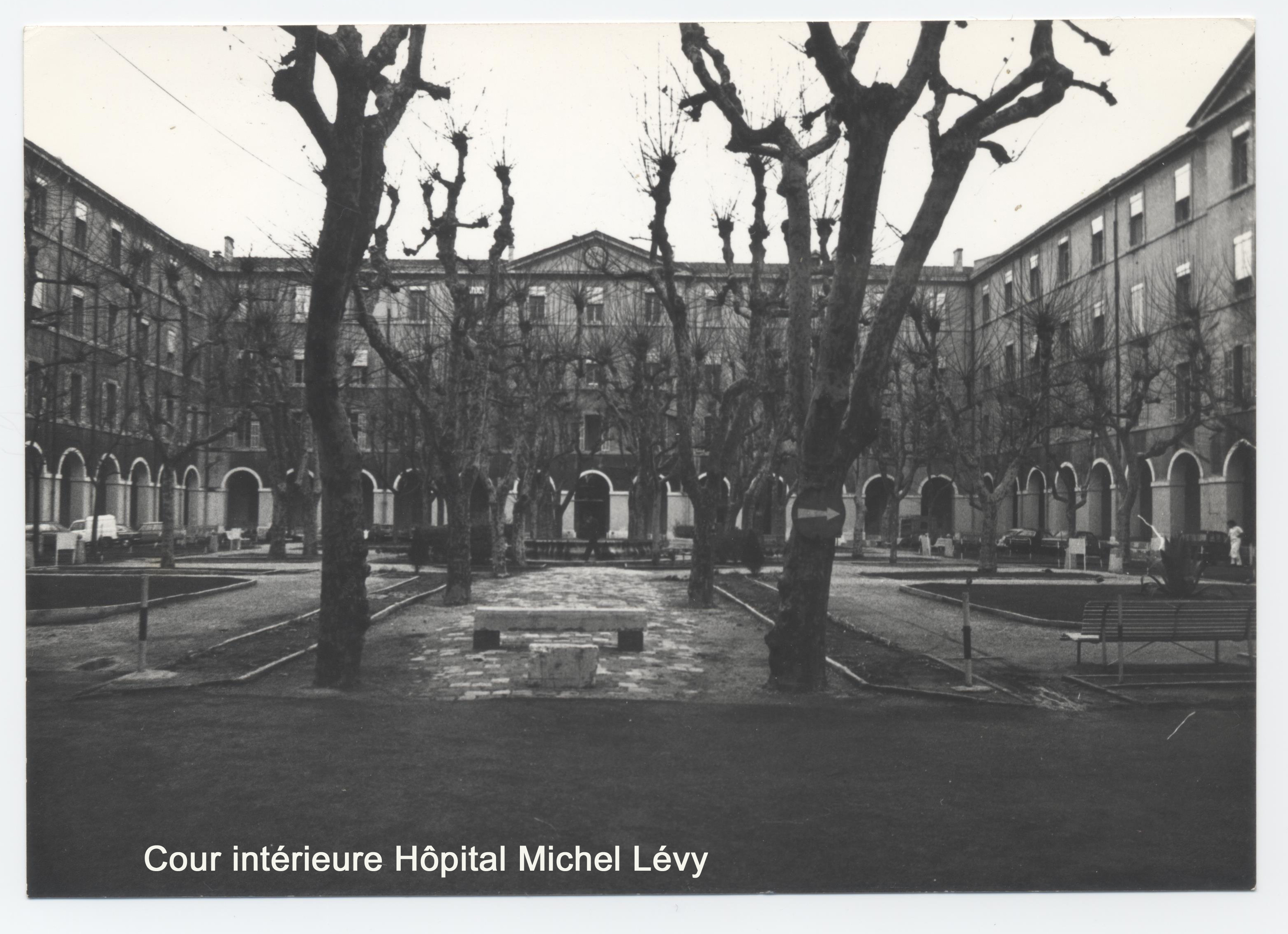 ajout d'une photo de la cour intérieure de l hôpital